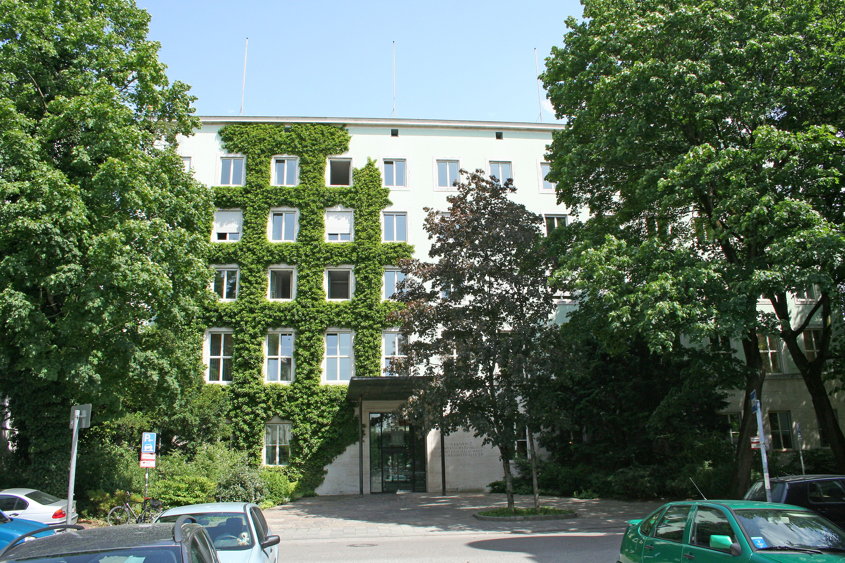 Allianz Aussenansicht Königinstr. 28 in München